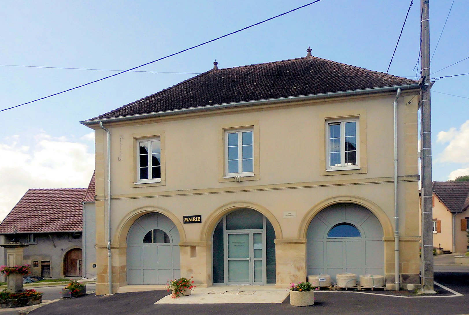 La mairie d'Anchenoncourt-et-Chazel